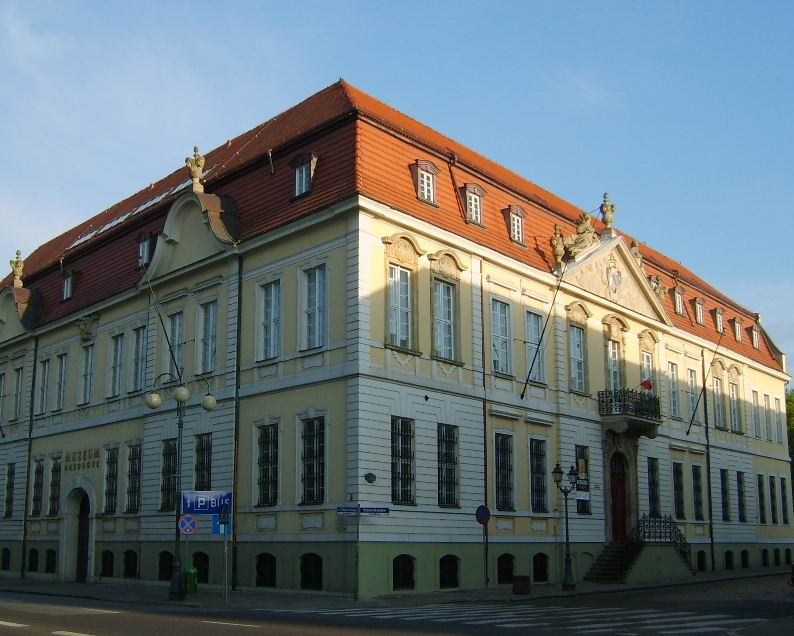 Szczecin: Pałac Sejmu Stanów Pomorskich (Landeshaus)